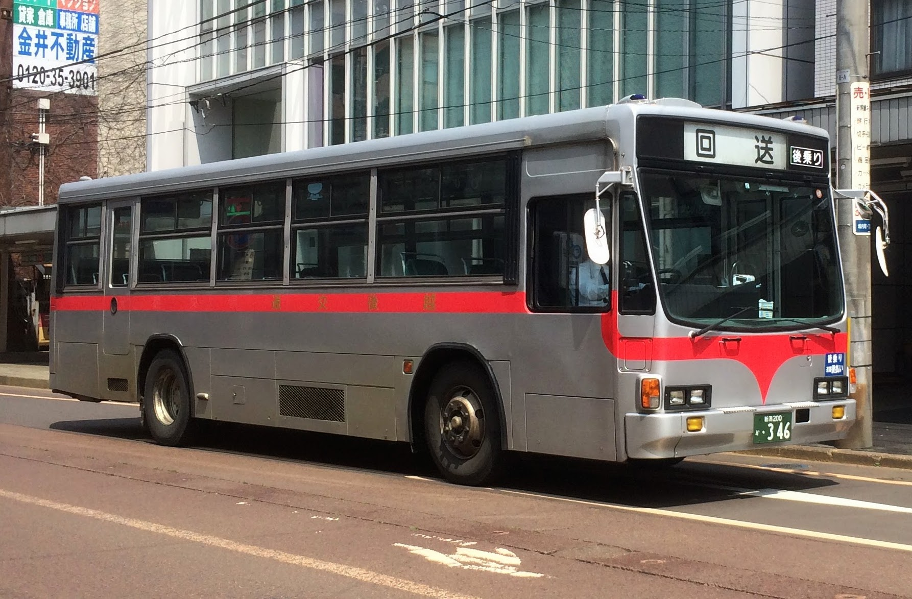 越後交通県央観光の車両